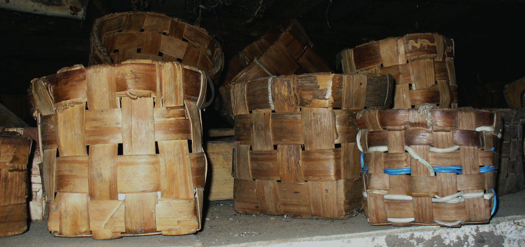 Корзины из еловой драни. Витебская обл. Belarus.